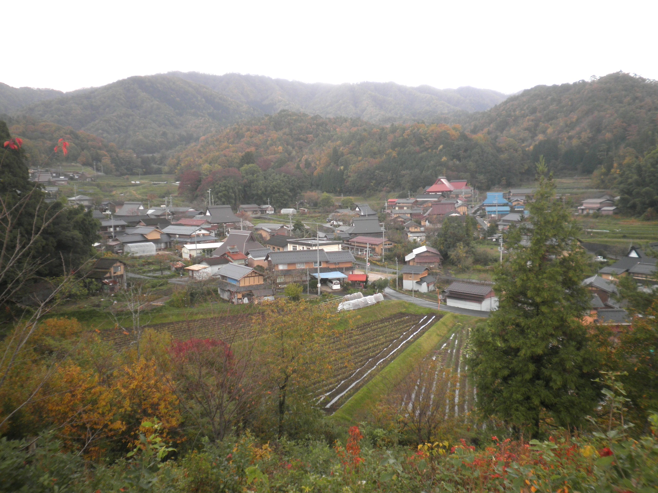 小町公園から撮影したja:京丹後市大宮町ja:五十河集落